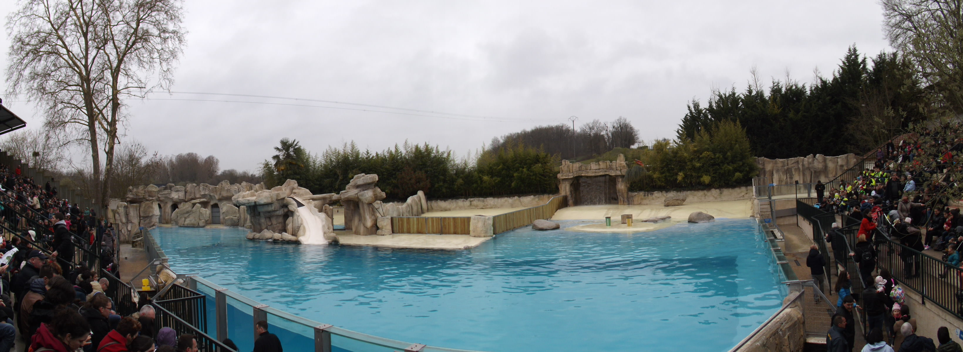 Bassin des otaries de Californie du ZooParc de Beauval, lieu du spectacle L'Odyssée des lions de mer